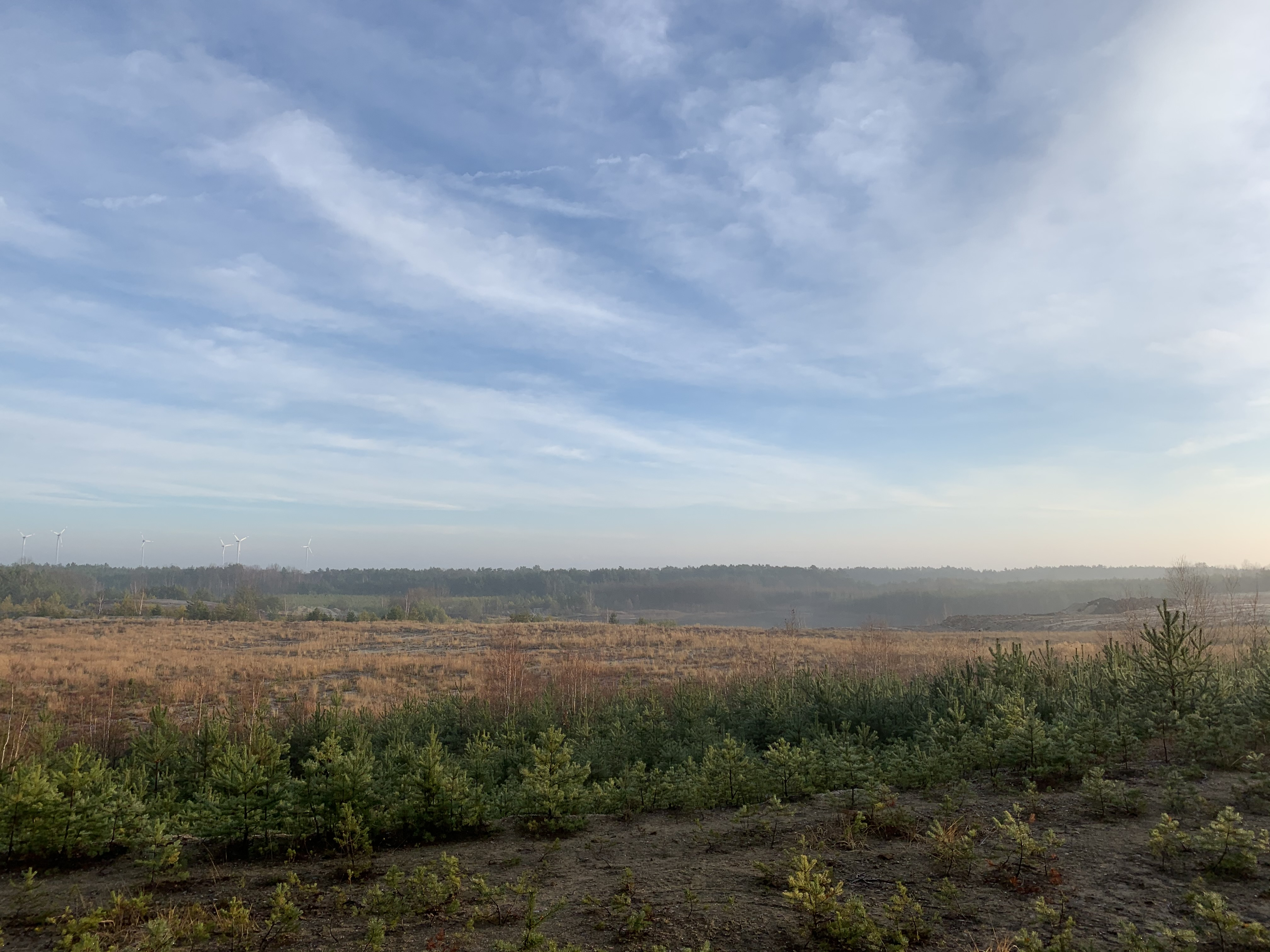 Plieskendorf, ein Gemeindeteil des Ortsteils Werchow der Stadt Calau in Brandenburg